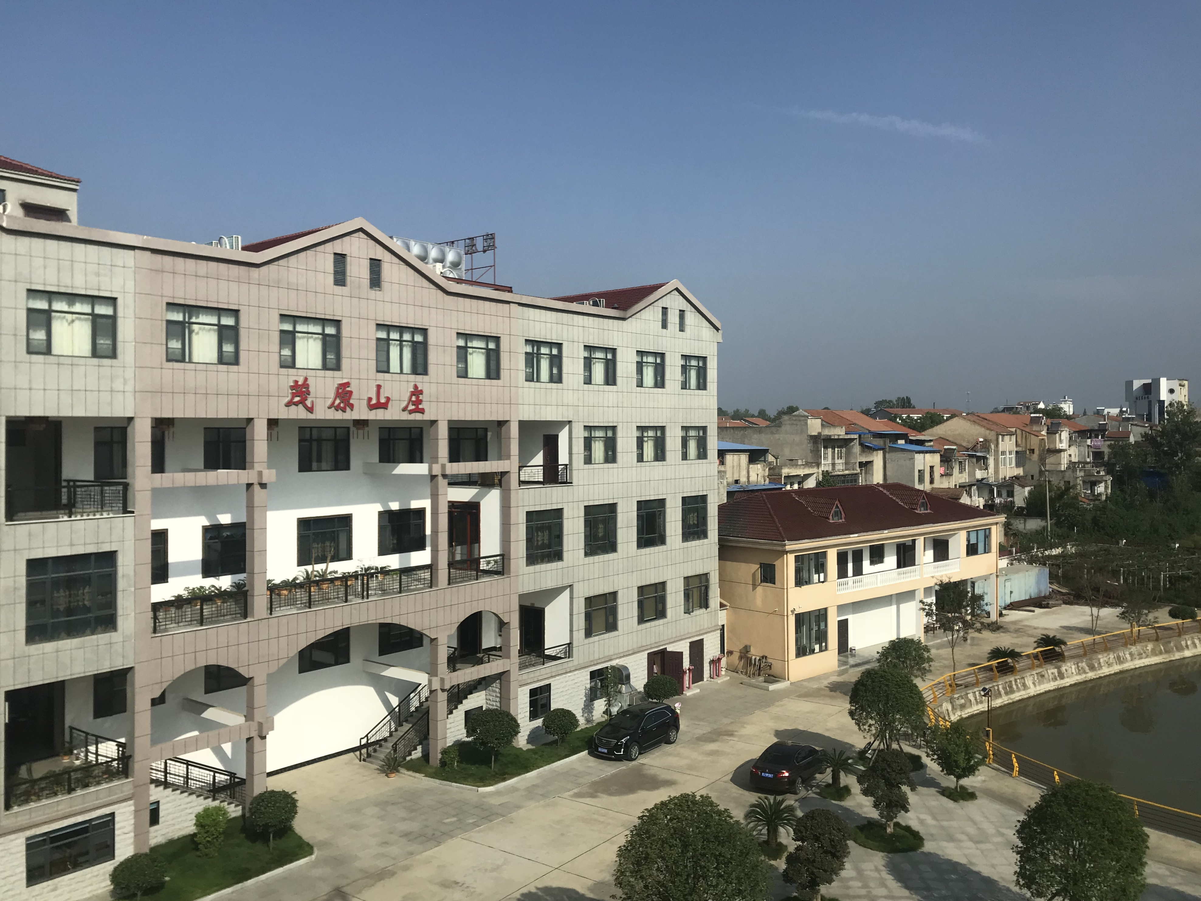 合武線の列車内より望む紅安西駅東側の八里湾鎮市街地